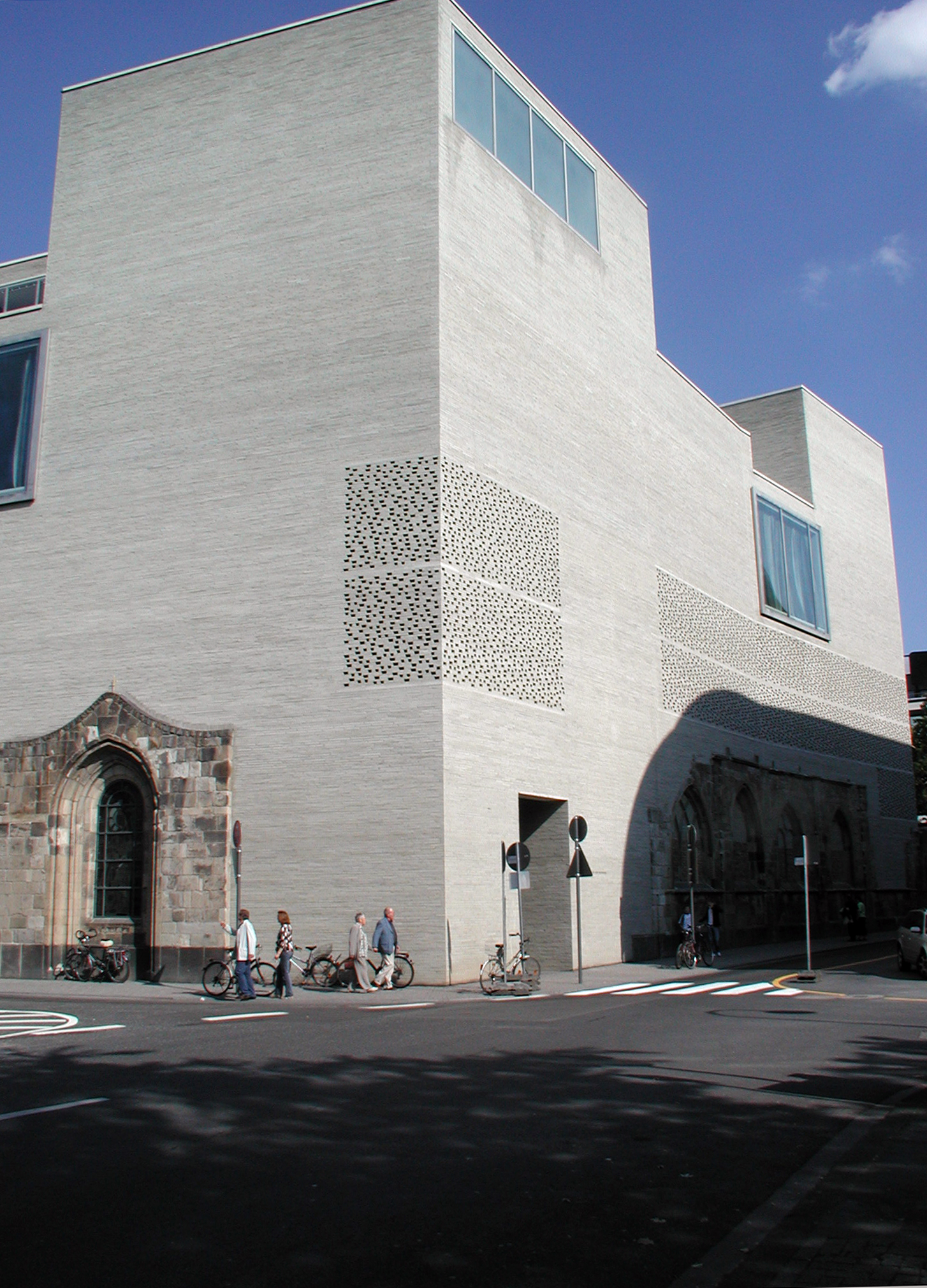 Köln, Kolumba-Museum und Kapelle